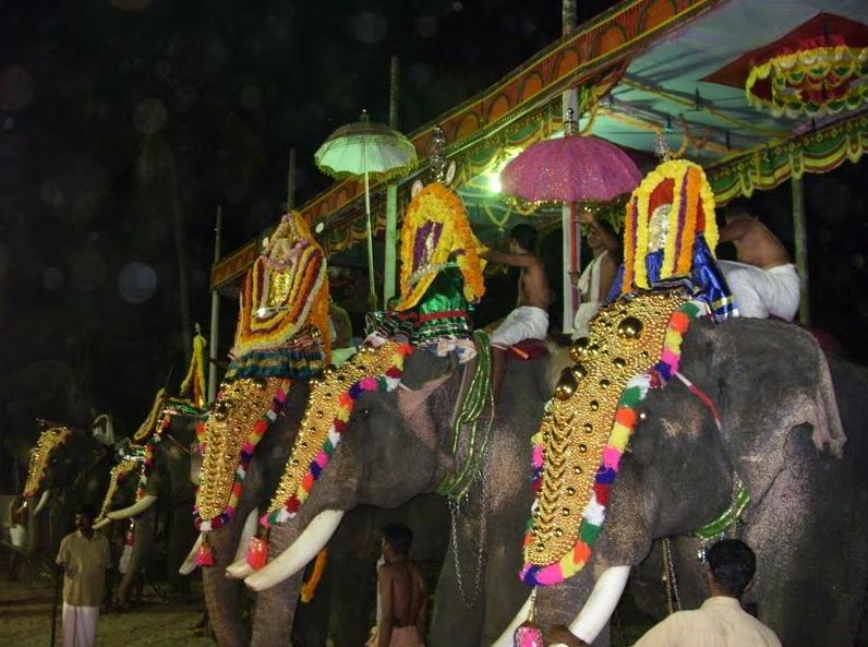 നാല്പത്തെണ്ണീശ്വരം-ഉത്സവം-കൂടിയെഴുന്നള്ളത്ത്